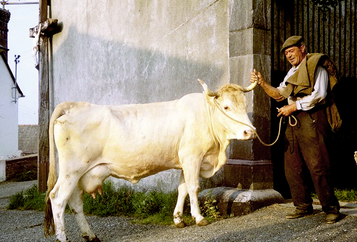 Photographie d'une vache de race Lourdaise, prise vers 1966 à Bourréac (Hautes-Pyrénées), devant le portail de la maison En ço de Borie, elle est tenue par François Sarthe dit François de Passet (de en ço de Passet), agriculteur de Lézignan